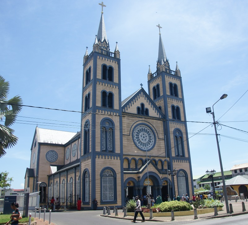 St Petrus en Pauluskathedraal, Henck Arronstraat 22-24, Paramaribo, Suriname